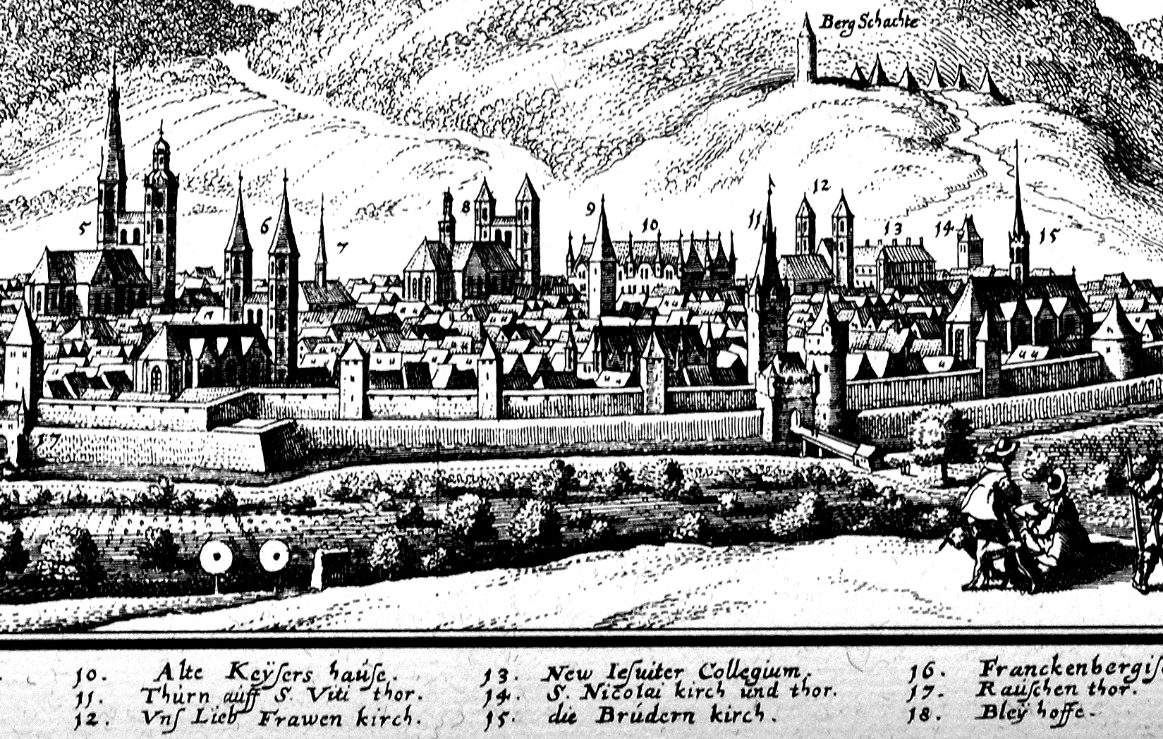 Ansicht der Stadt Goslar, Ausschnitt